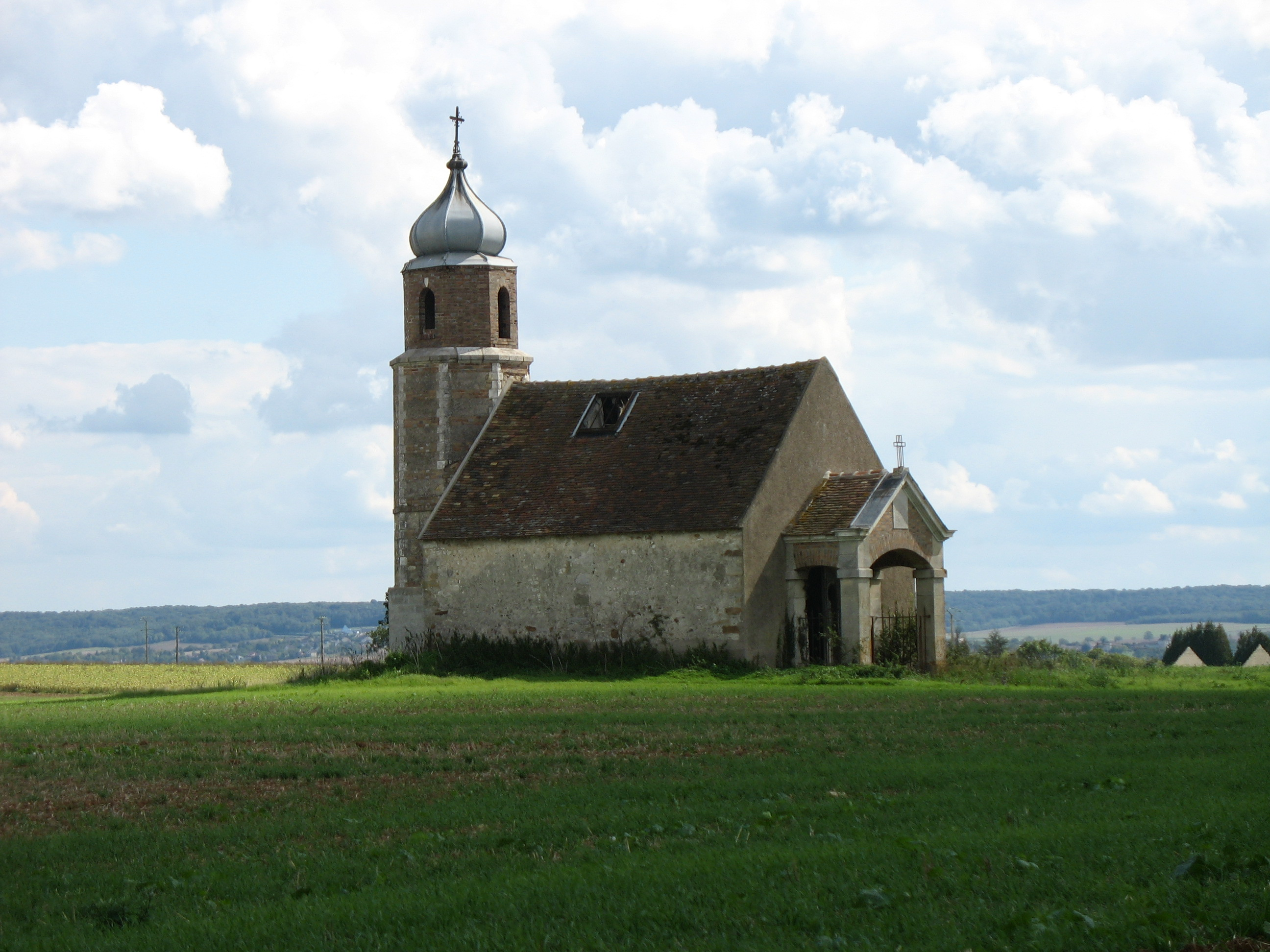 Chapelle surplombant Misy